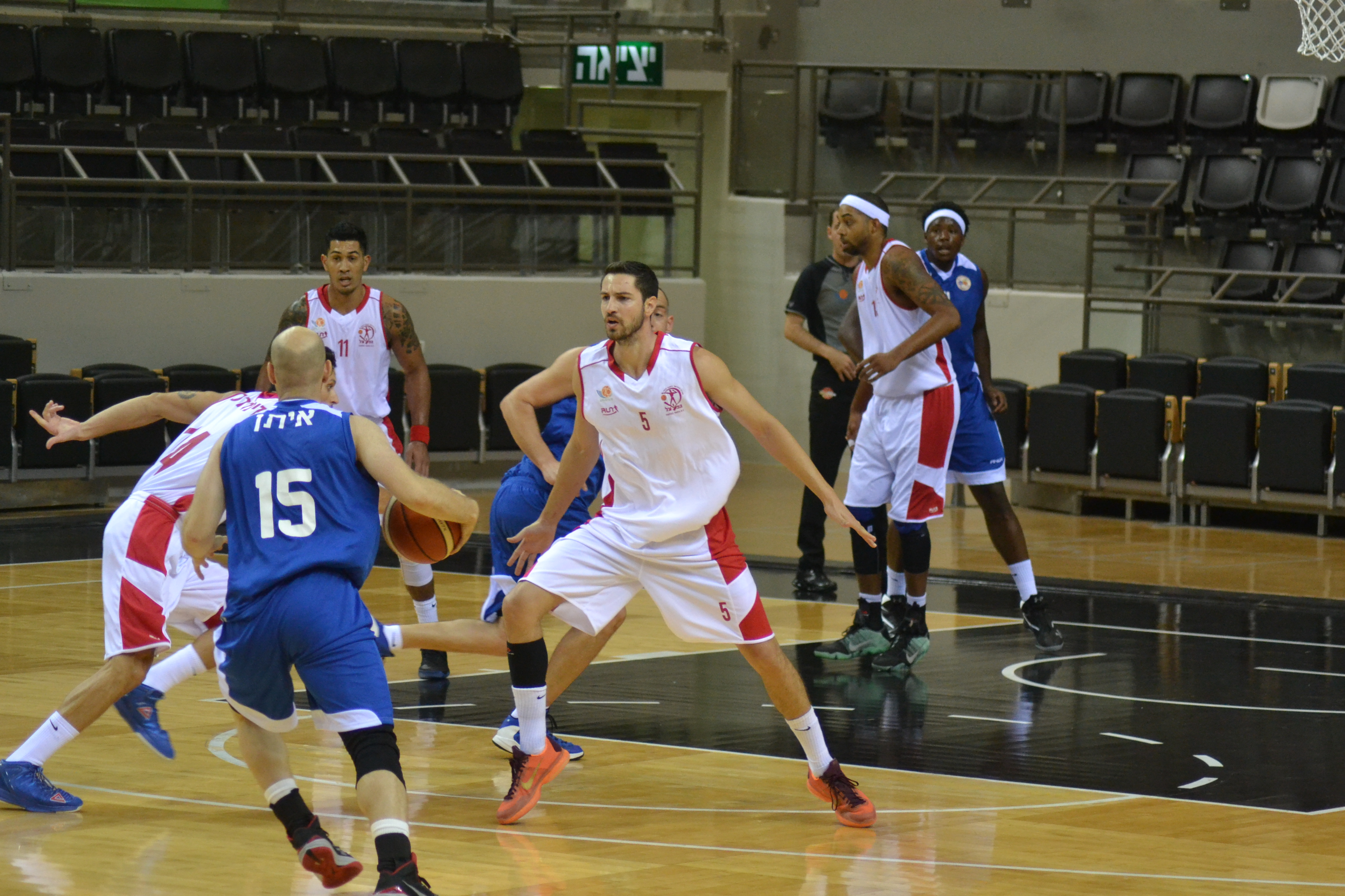 גל איתן (בכחול) במדי מכבי רחובות במסגרת גביע המדינה 2016